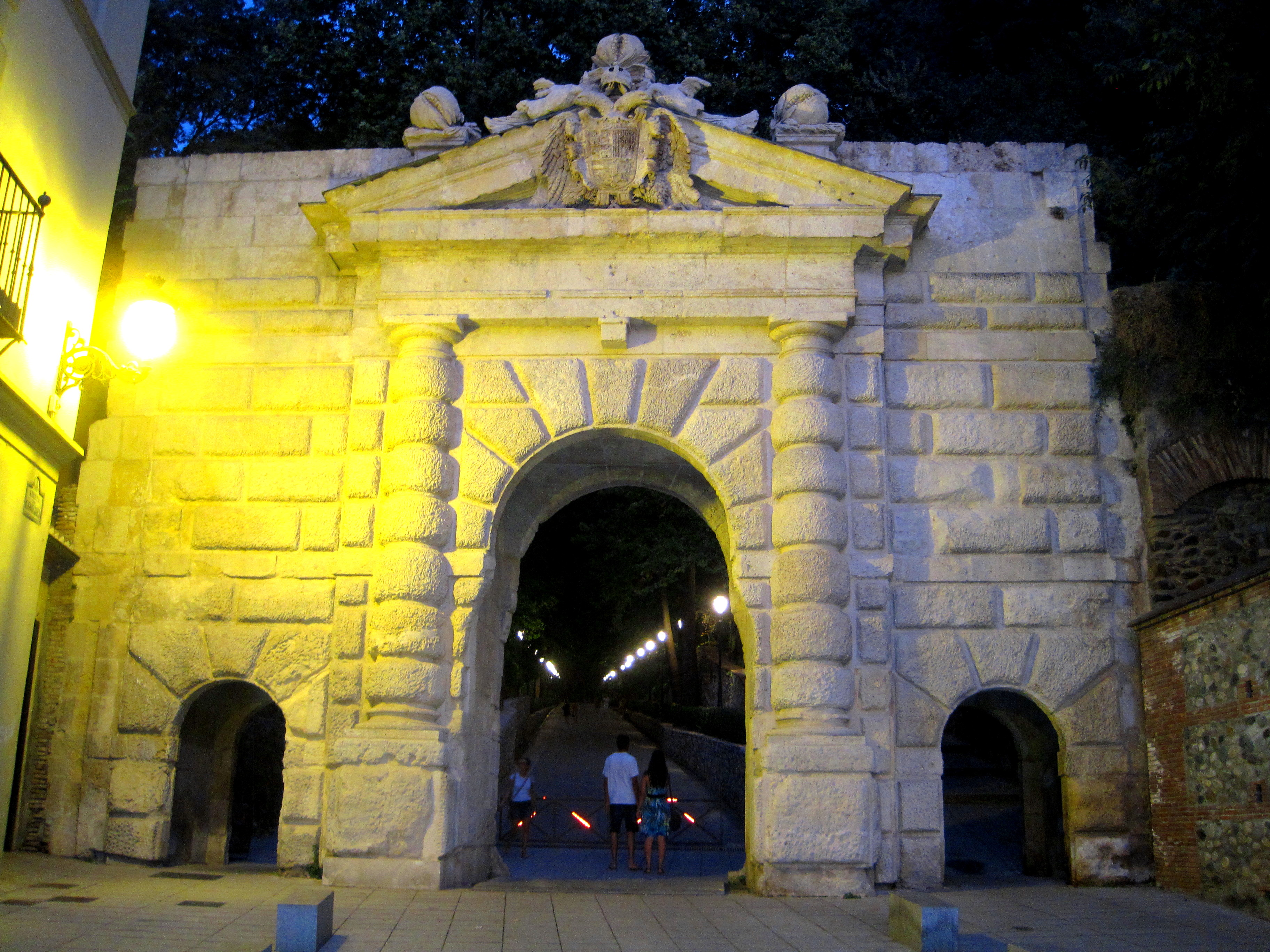 Sección 2 Accesos a la Alhambra